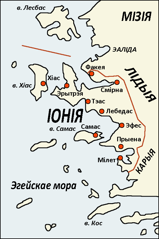 Старажытная Іонія (карта)